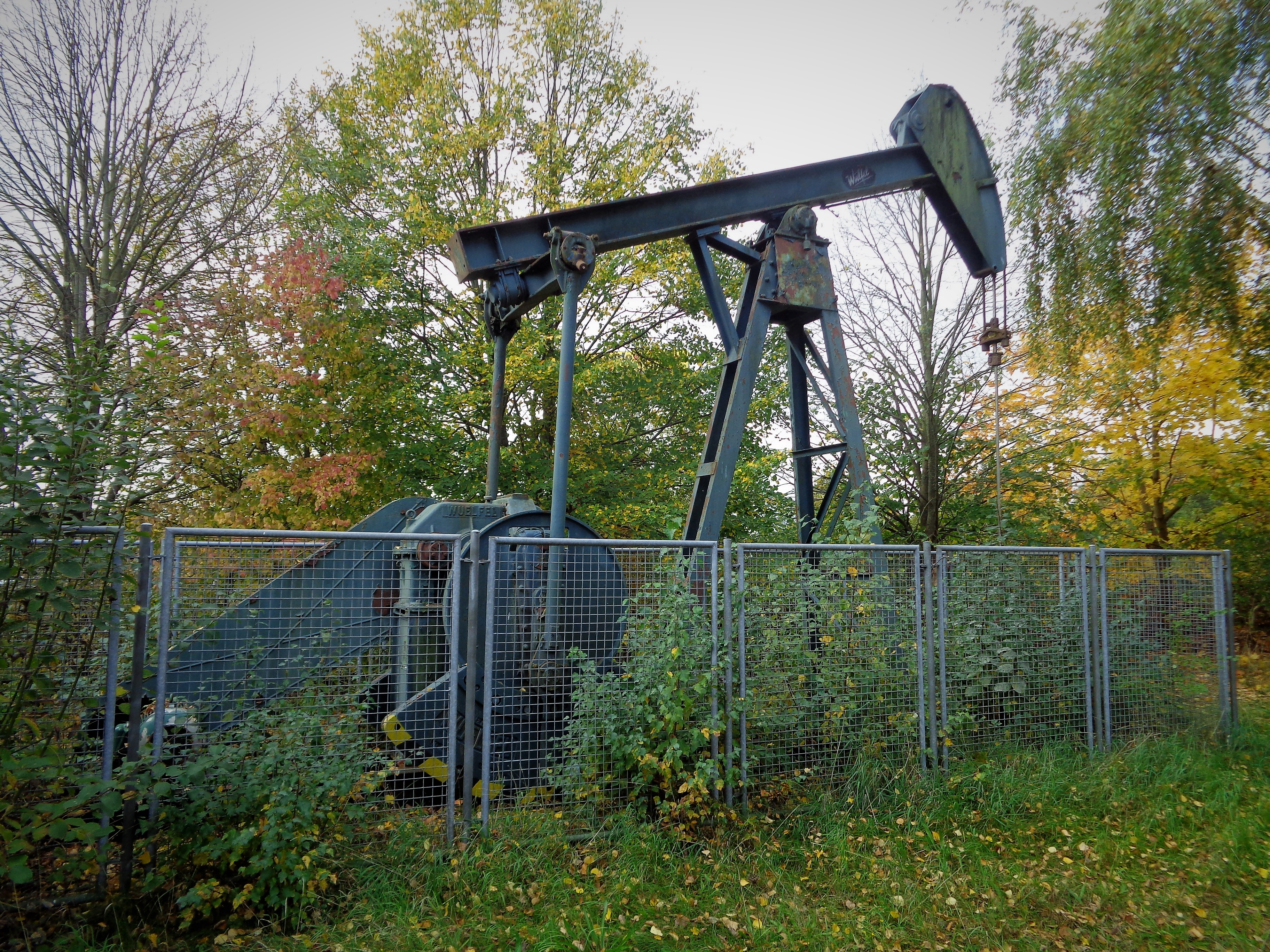 Gesamtansicht einer Erdölförderpumpe in Raisdorf / Schwentinental.